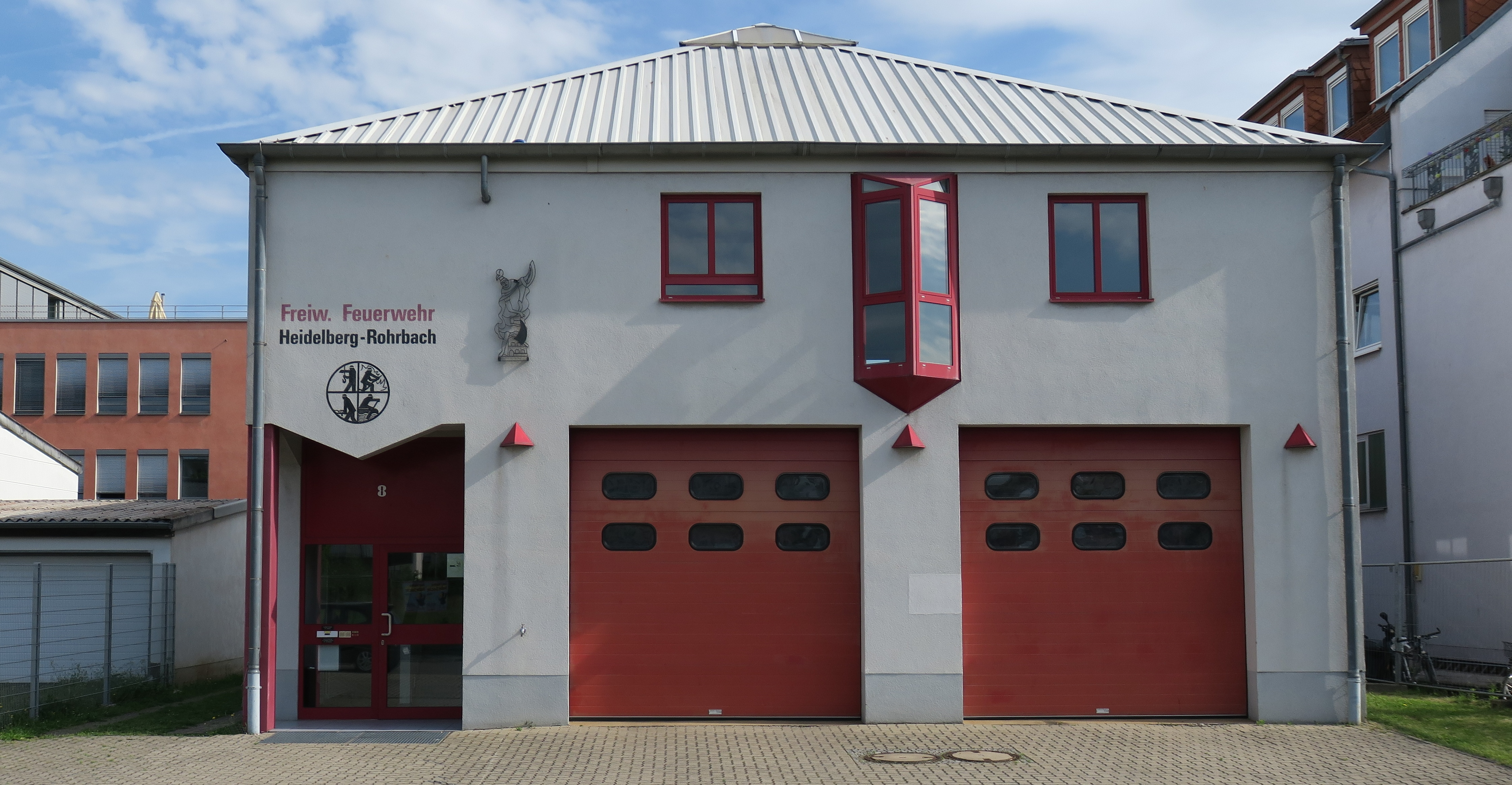 Feuerwehrhaus der Einsatzabteilung Heidelberg-Rohrbach